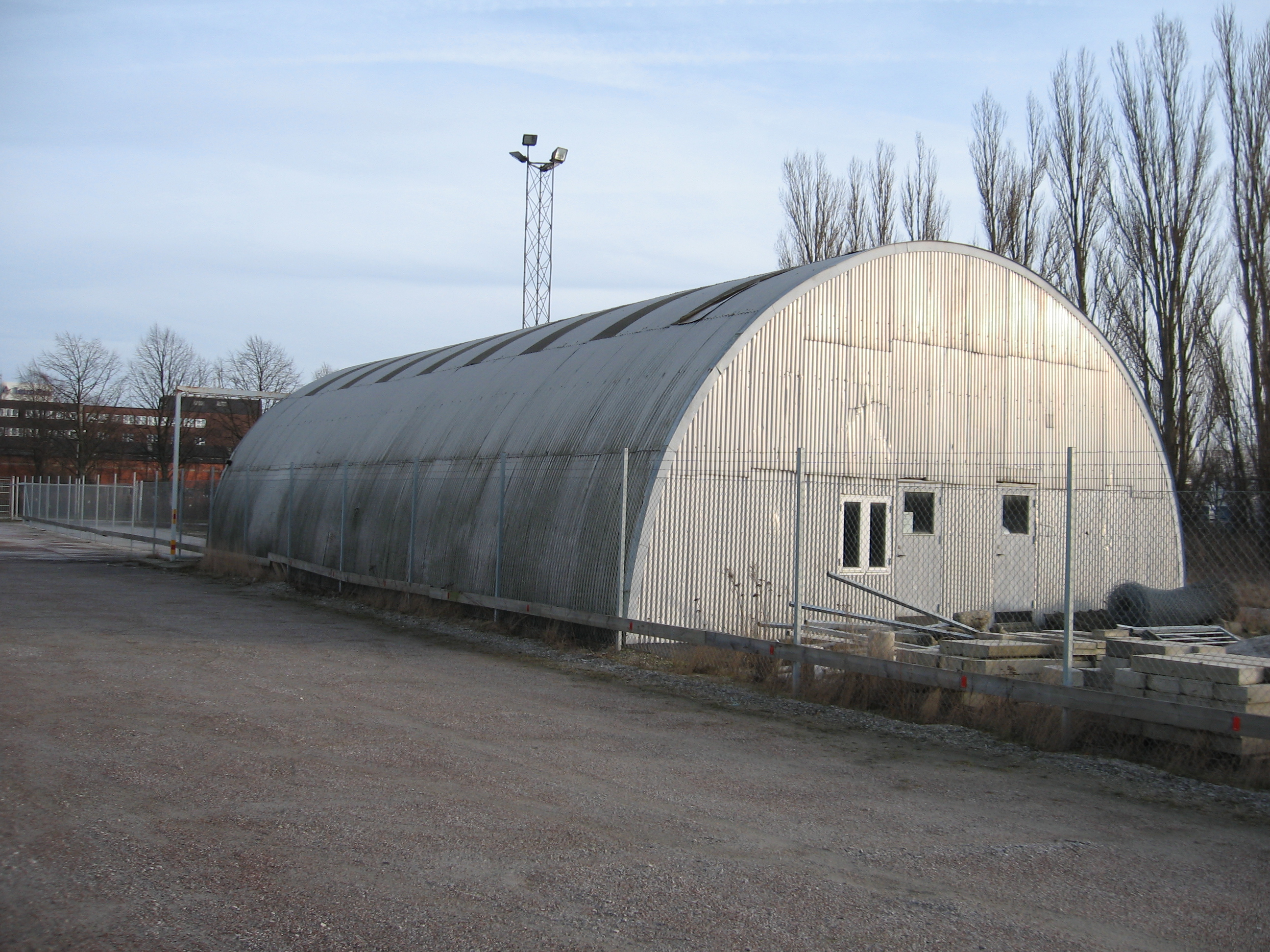 Båghall i Lund